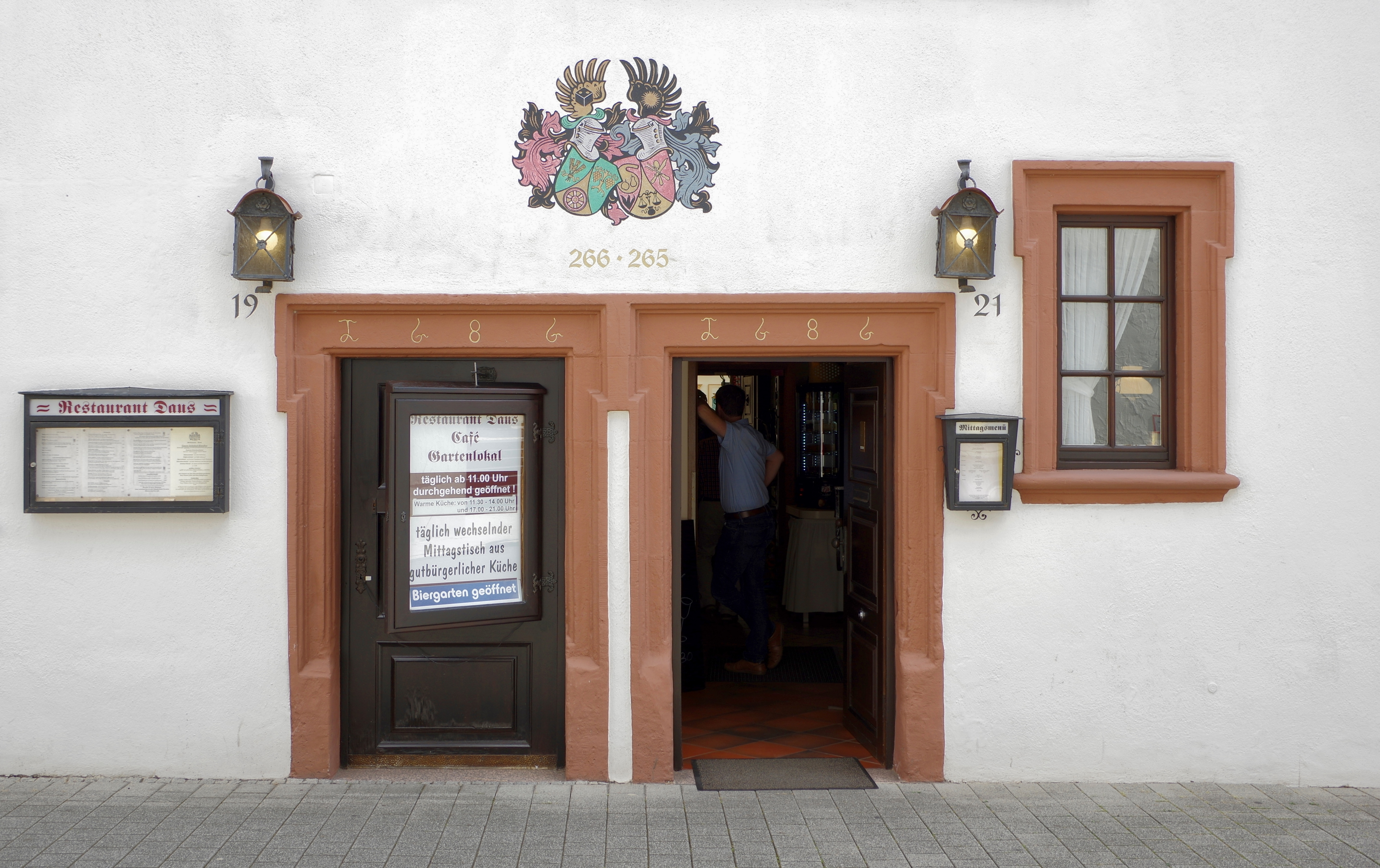 Wittlich, Karrstraße 19/21, Haus Daus, Putzbau mit Zwillings- und Drillingsfenstern, im Kern aus dem früheren 16. Jahrhundert, Umbau 1686